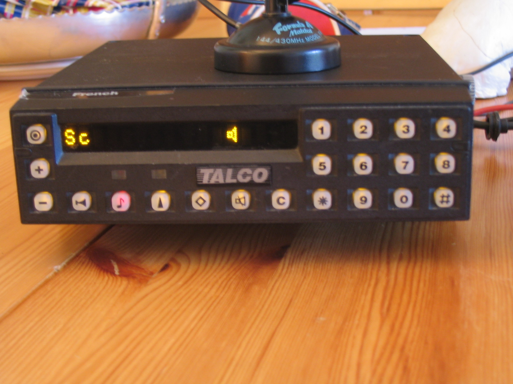 F4DYT: Transceptor VHF Talco CS-160 F4DYT: Talco CS-160 VHF transceiver